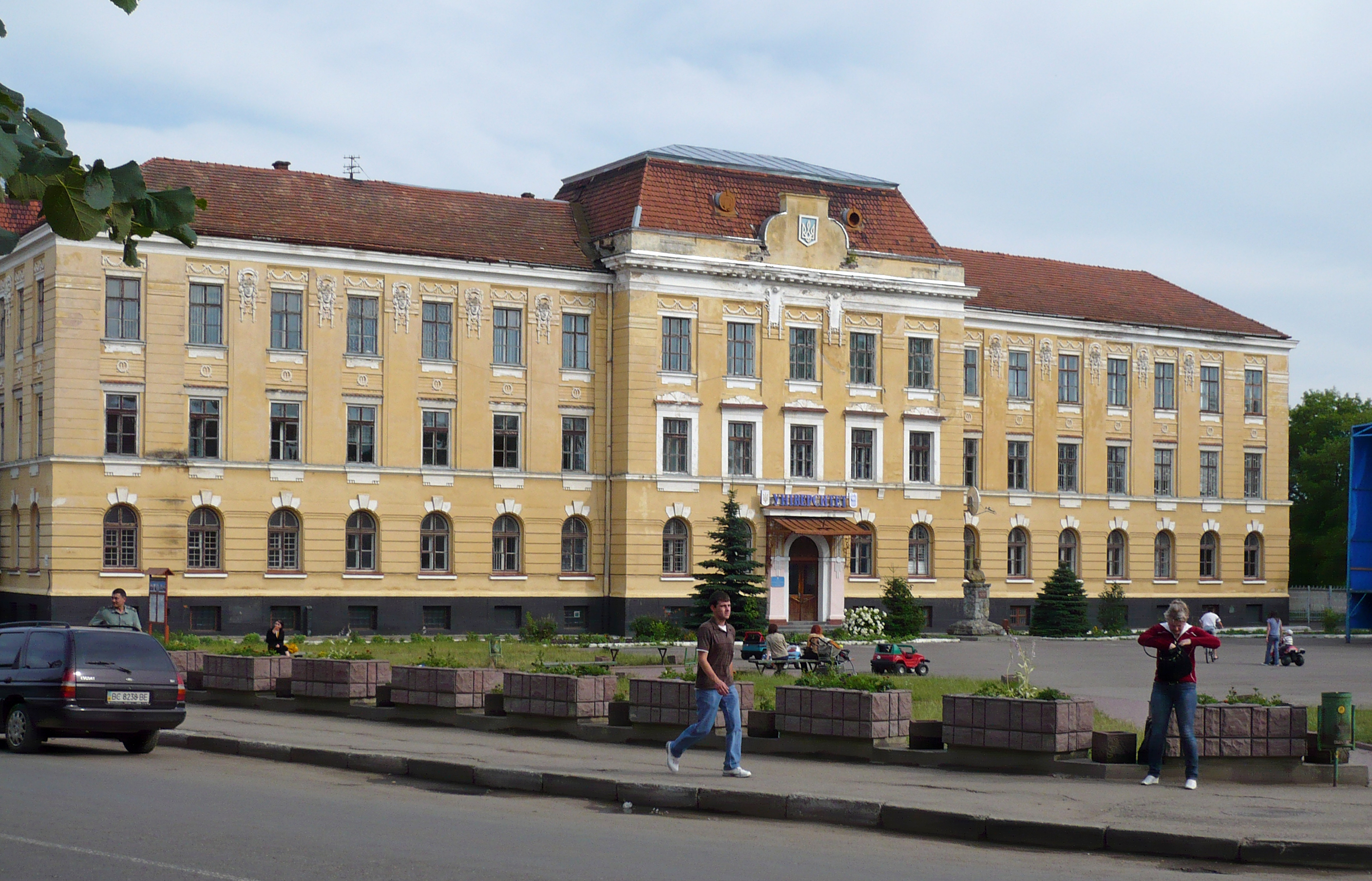 Sambor - Uniwersytet